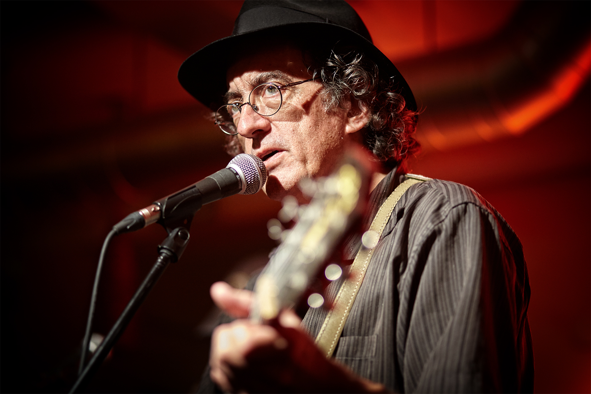 James McMurtry live in Eppstein bei Frankfurt a.M. 2017